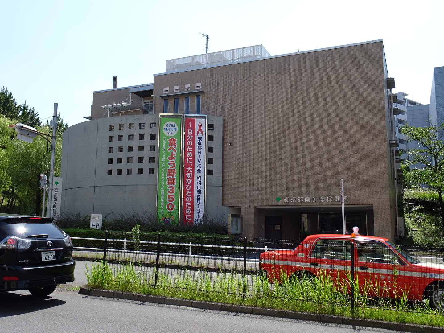 多摩市永山にある東京都南多摩保健所（15/06/24撮影）